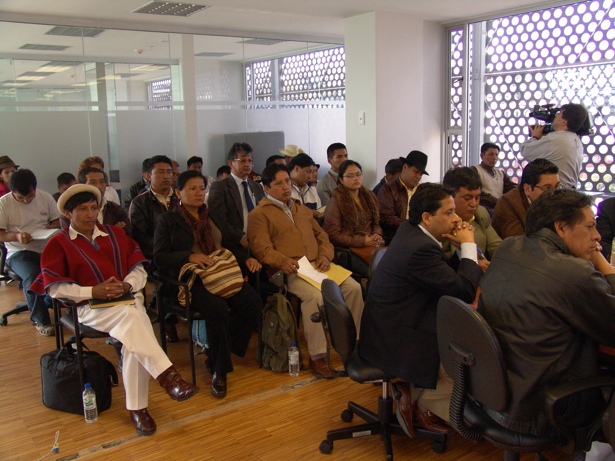 20 de agosto